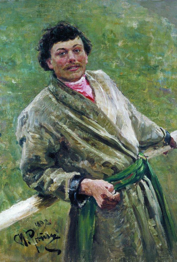 Портрет Сидора Ивановича Шаврова